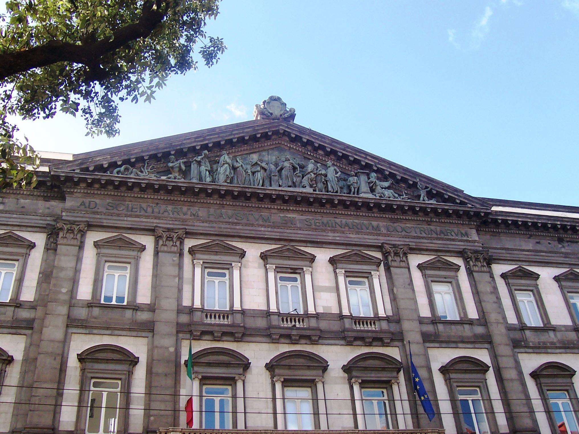 Ad Scientiarum Haustum et Seminarium Doctrinarum, Università di giurisprudenza di Napoli (Federico II).